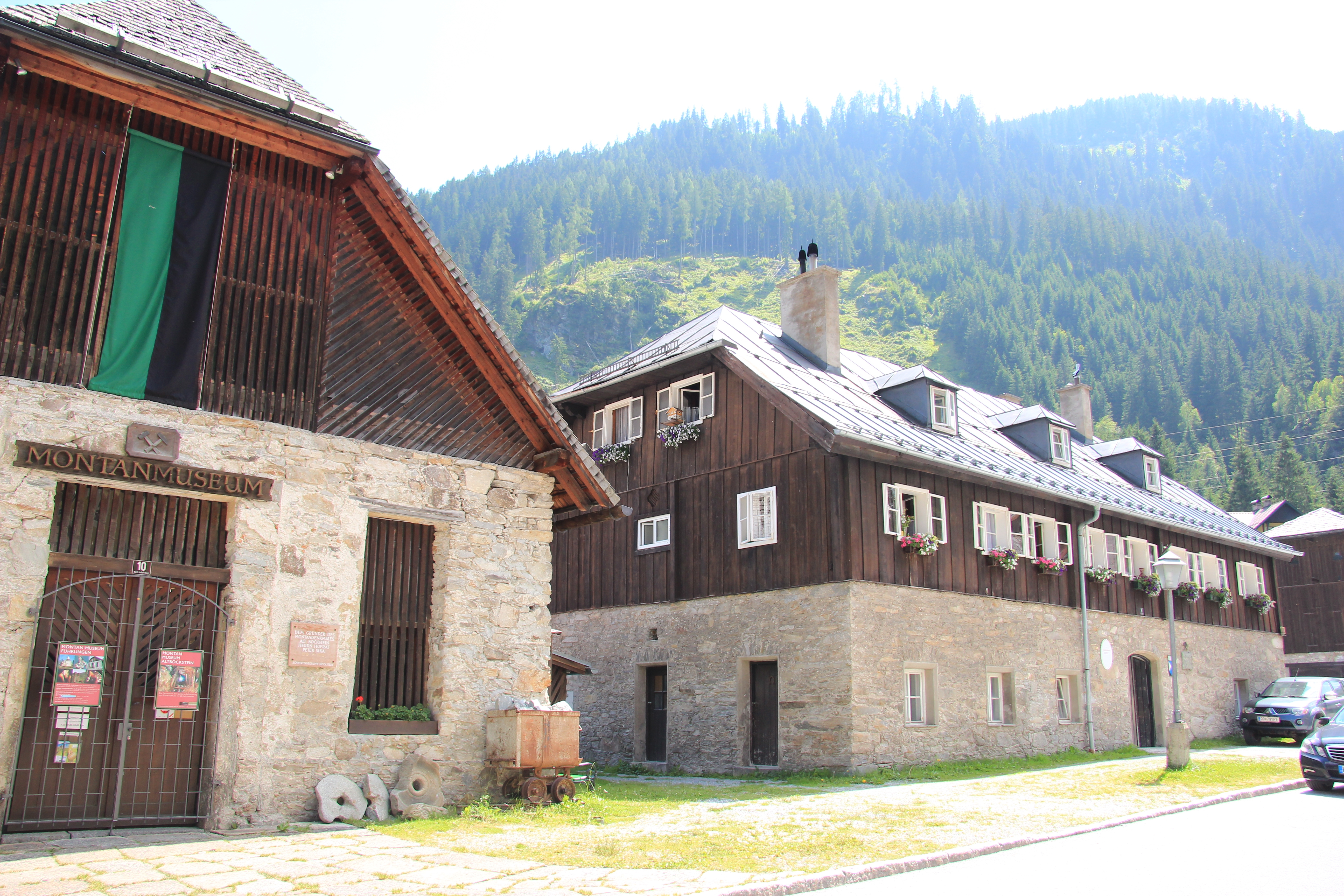 Böckstein